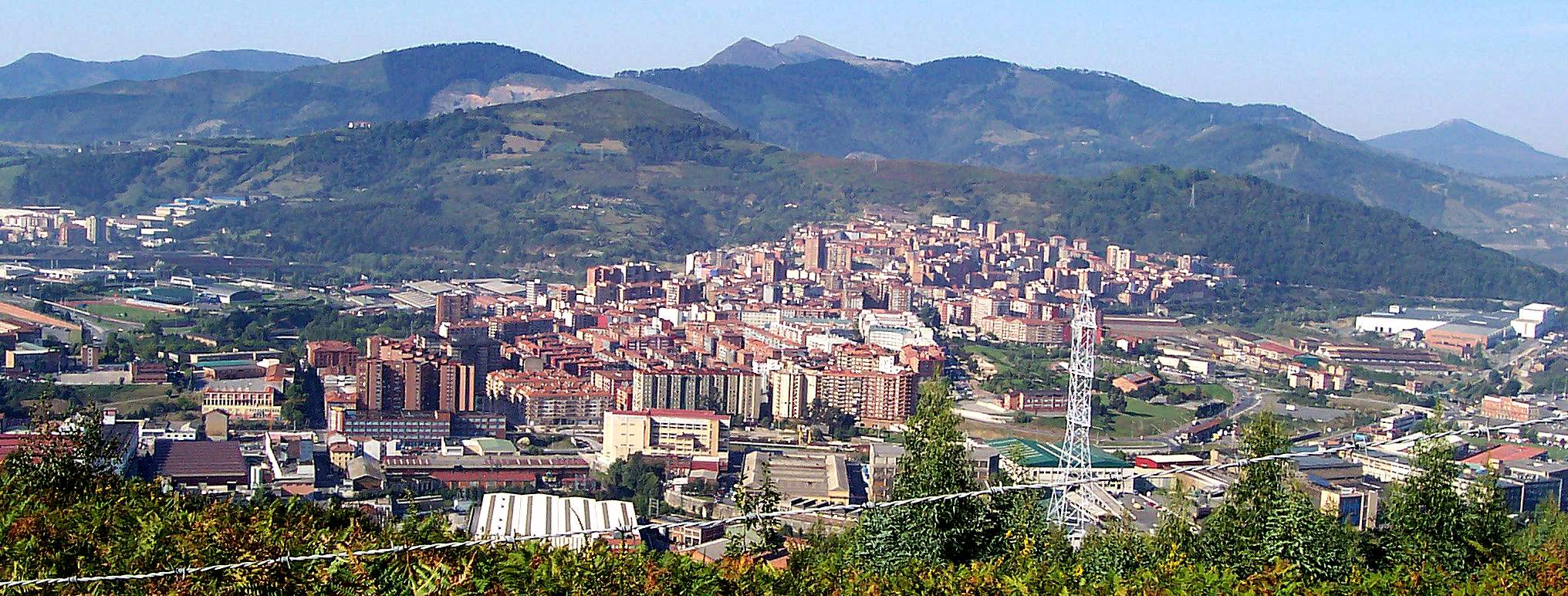 Para localizar Basauri, pasaros por aquí